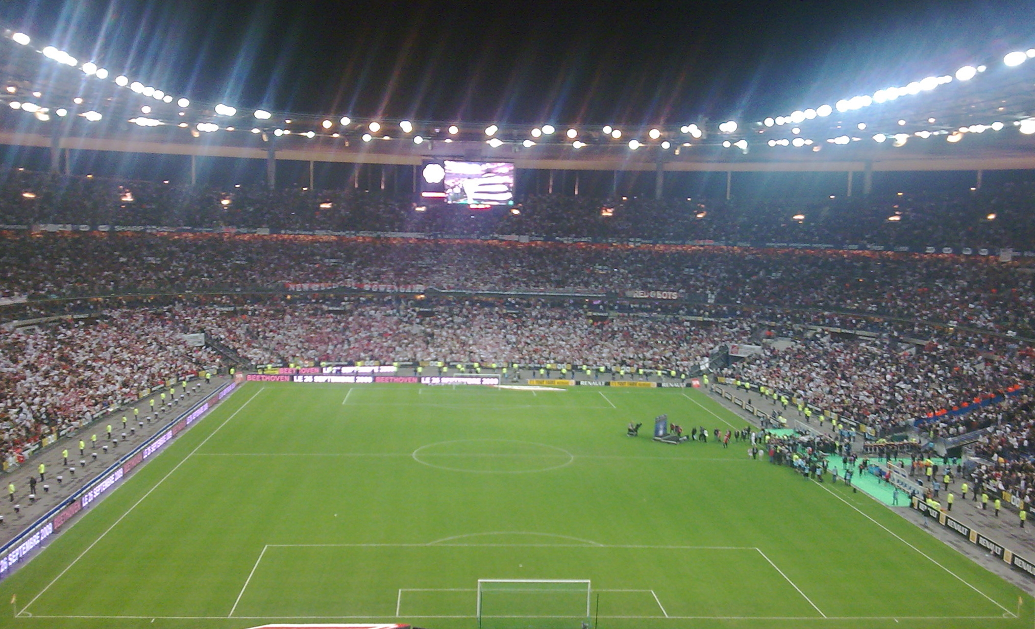 Photo du Kop Guingampais lors de la Victoire de l'équipe d'En Avant De Guingamp le 9 mai 2009 au Stade de France.